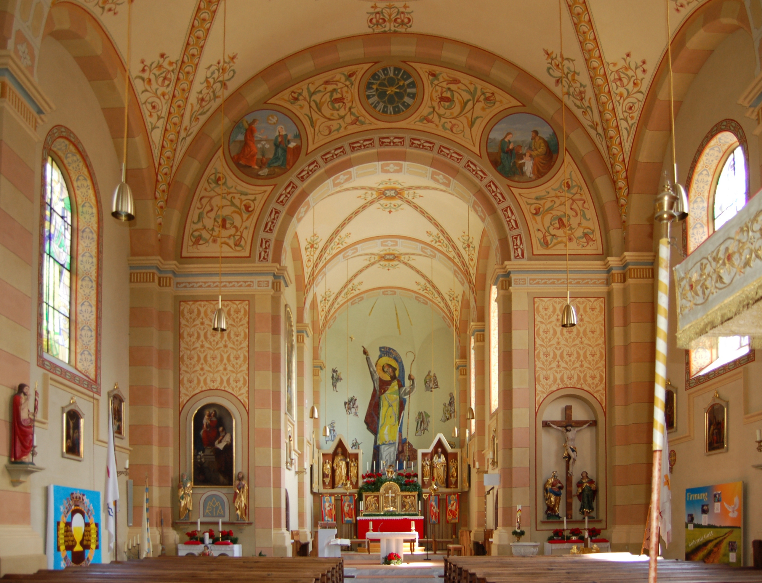 Die denkmalgeschützte Pfarrkirche St. Martin in Dölsach im Bezirk Lienz.